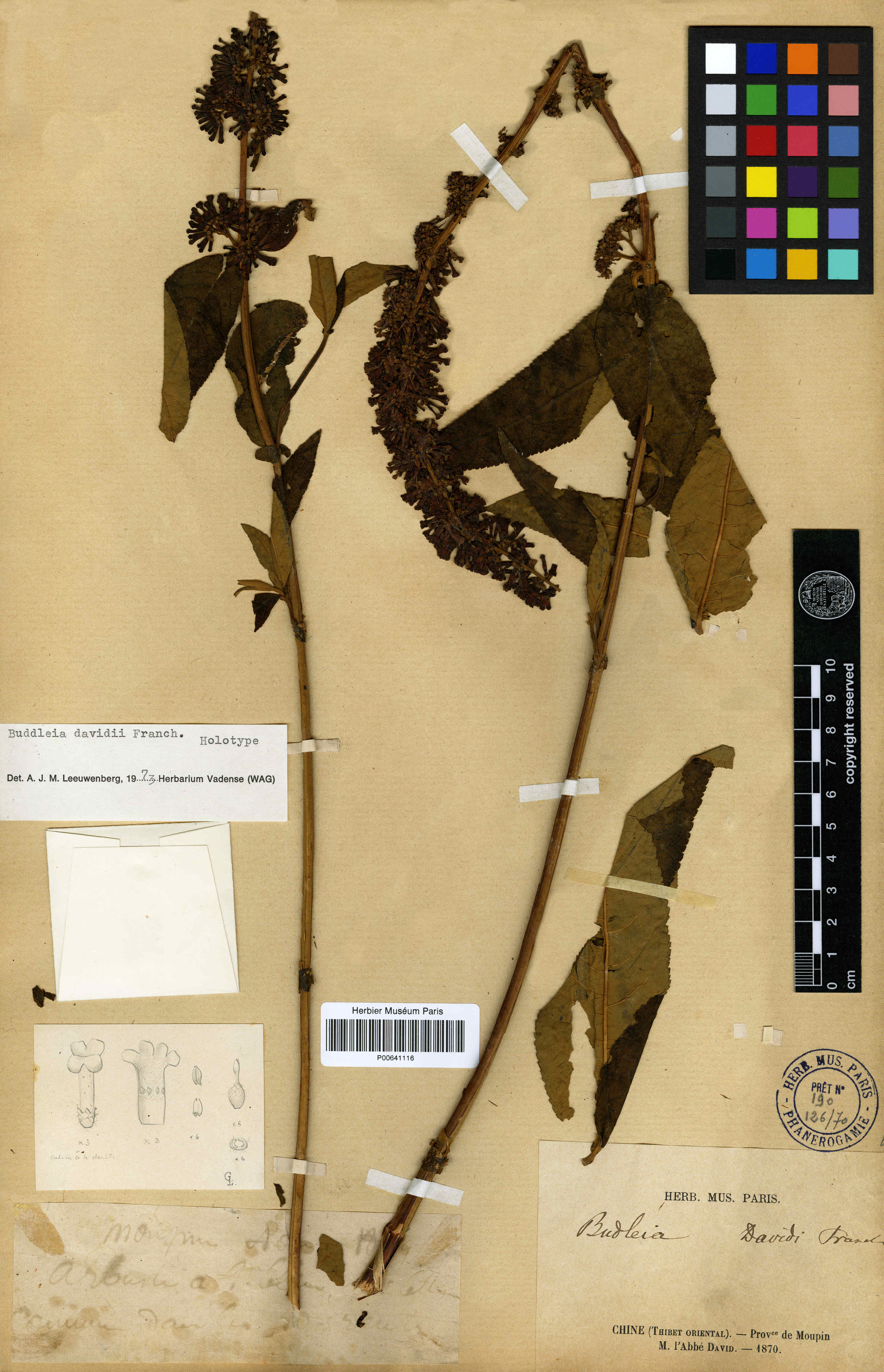 Selon la note d'A. David Arbuste à fl. bleues ou violacées non odorantes